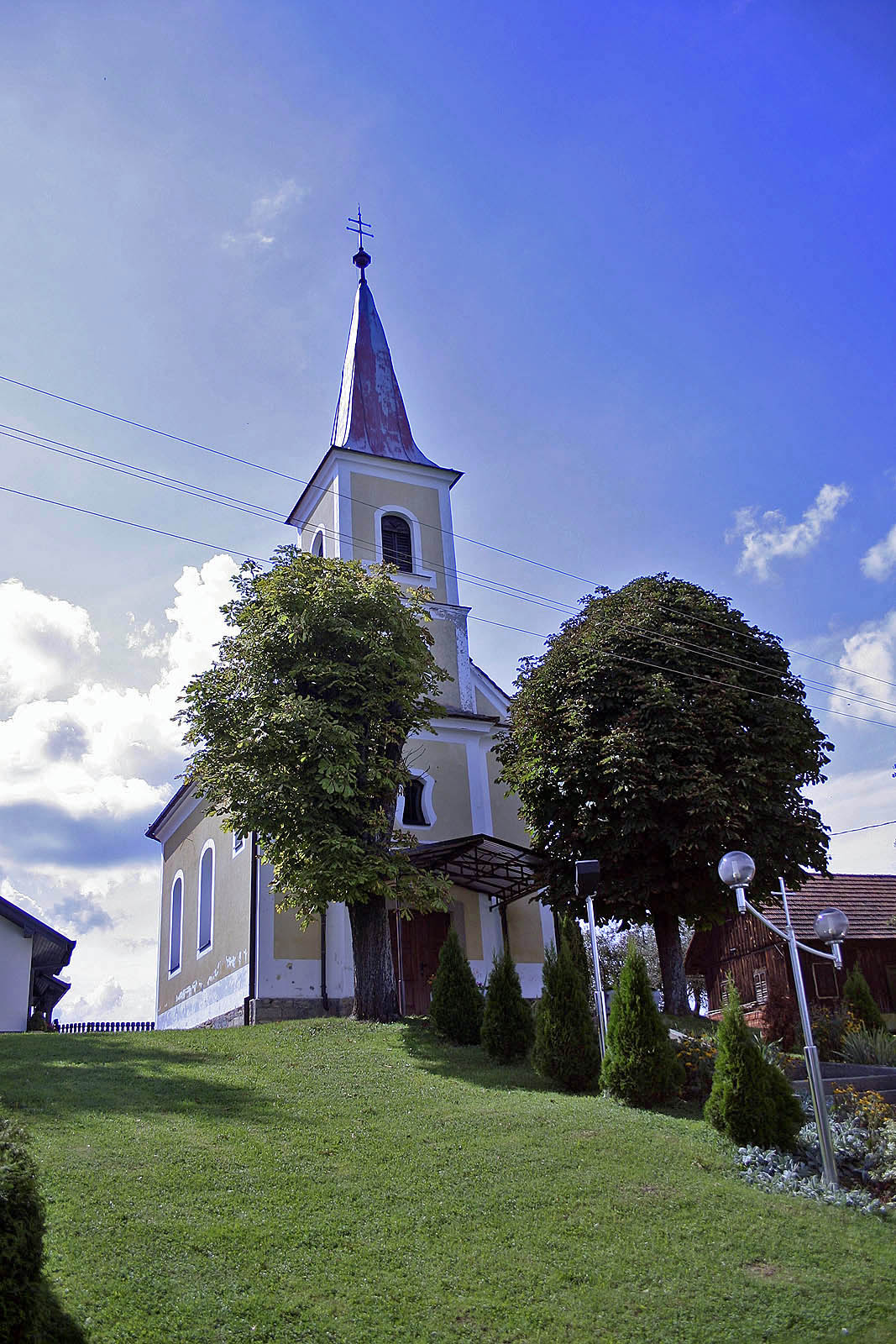 Kapela svetega Antona Padovanskega, Gerlinci. Holy Anthony of Padua chapel, Gerlinci. Heiliger Antonius von Padua Kapelle, Gerlinci.